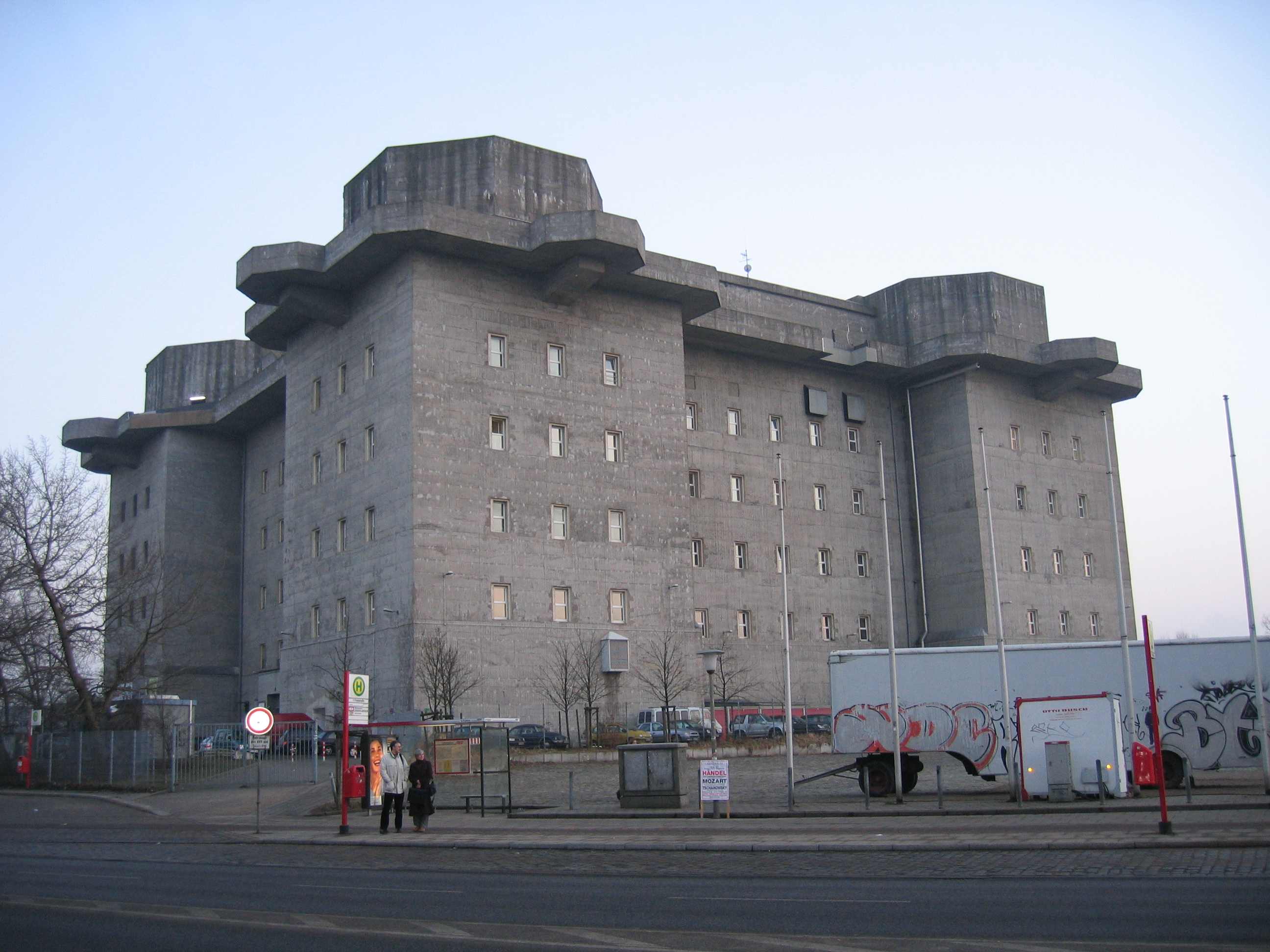 Photographer: User:San Andreas Date: 25 Jan 2006 Description: German Hochbunker, Heiligengeistfeld, Hamburg, Germany